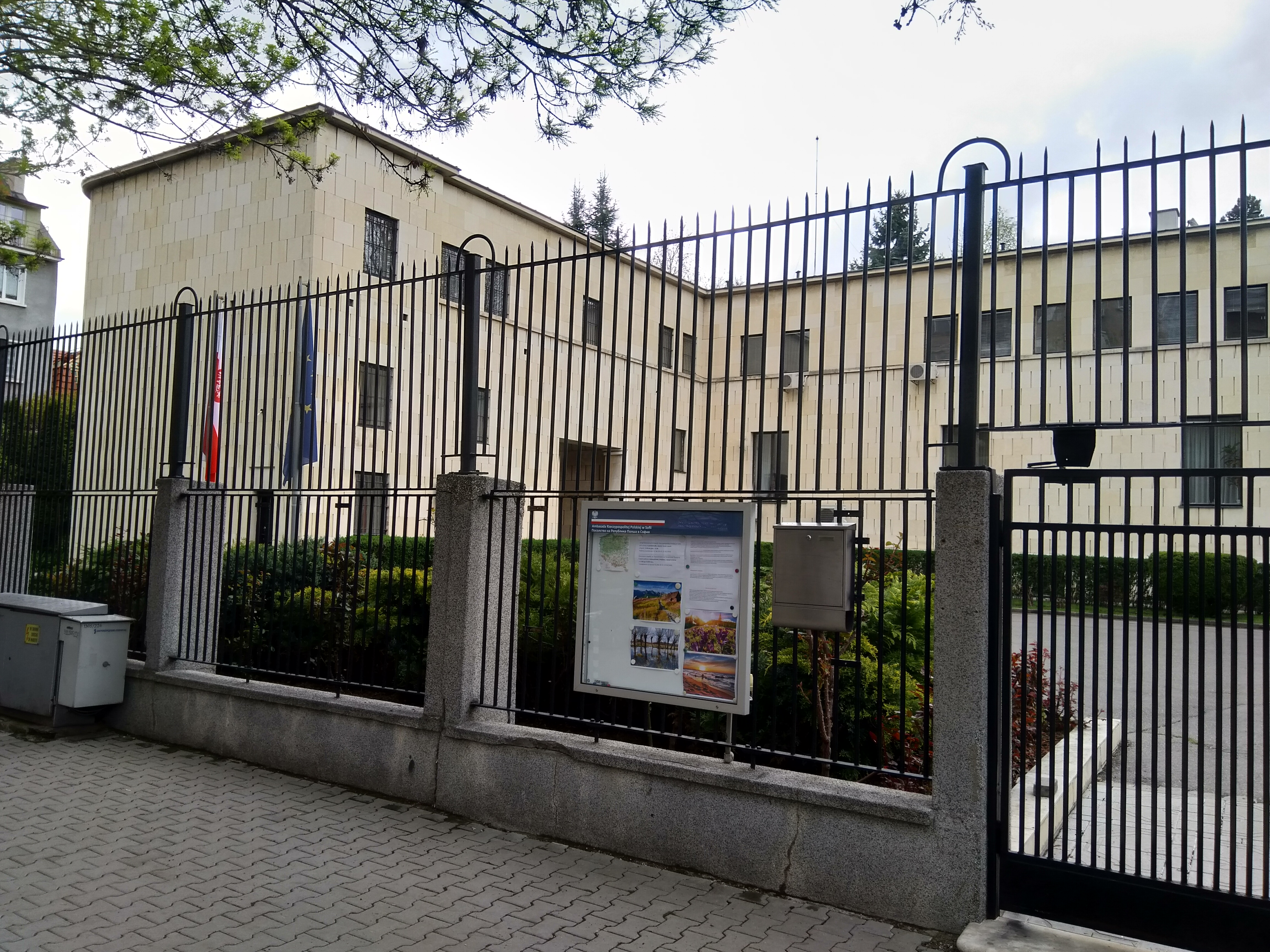 Ambasada RP w Sofii od północy